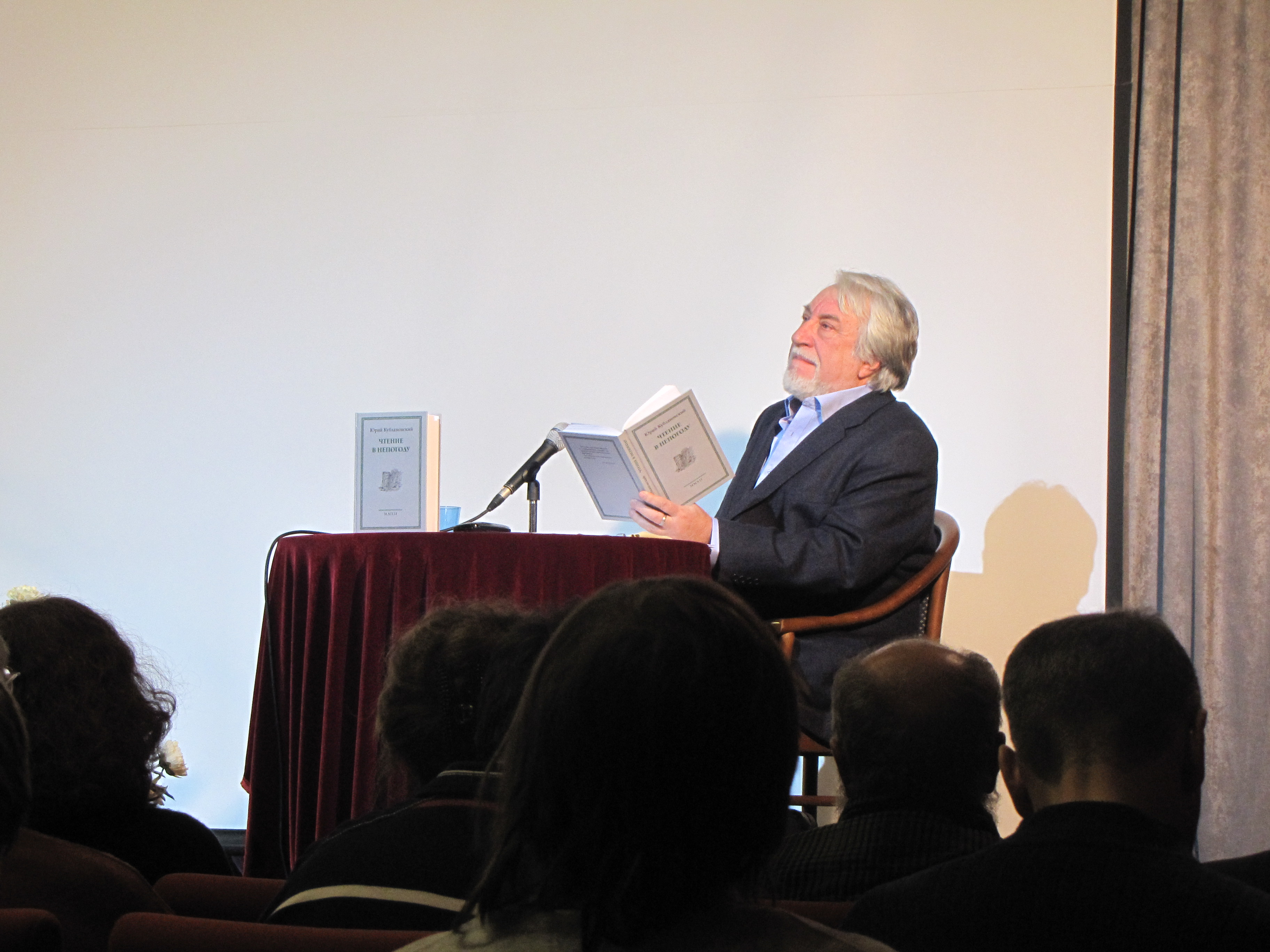 Юрий Кублановский на презентации книги "Чтение в непогоду" в Доме русского зарубежья имени Александра Солженицына